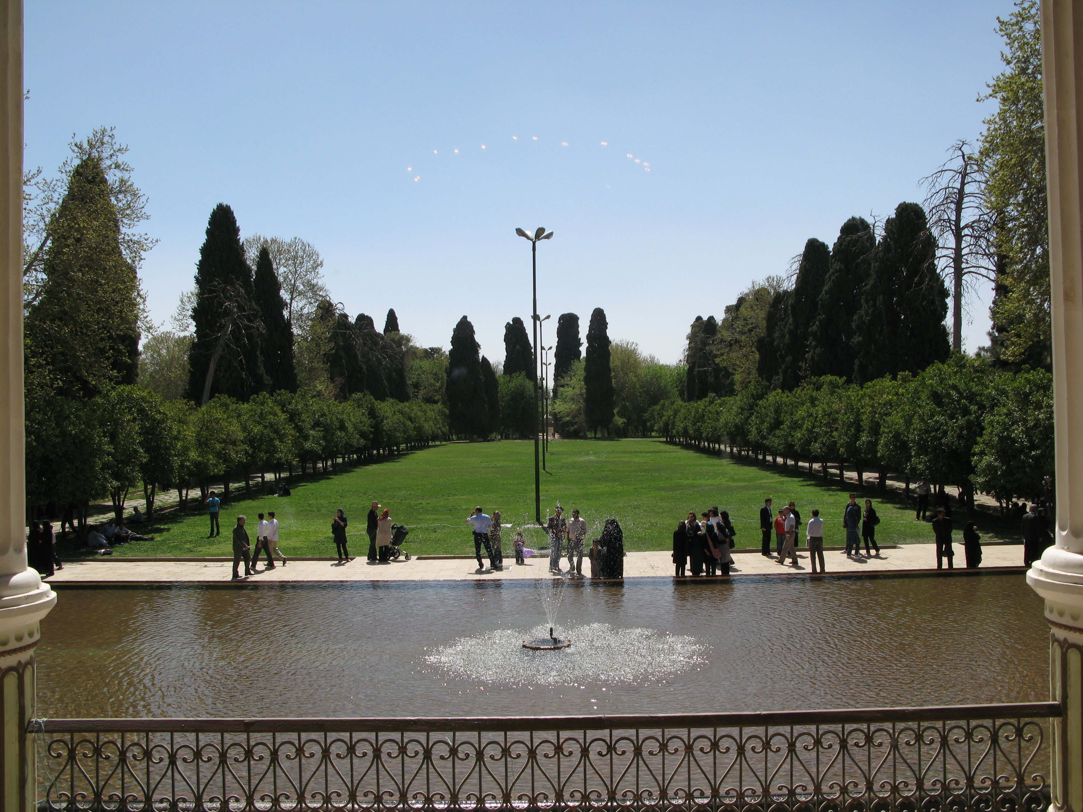 Afif abad garden, shiraz